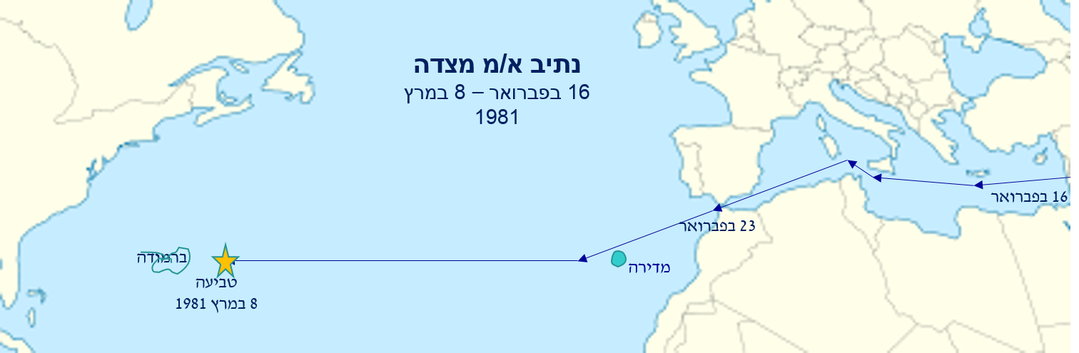 נתיב ההפלגה האחרונה של א/מ מצדה יצאה מאשדוד לכיוון בולטימור וטביעה מזרחית לברמודה